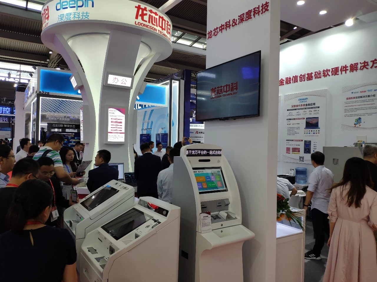 龙芯在第二十界中国金融发展论坛上的产品展览